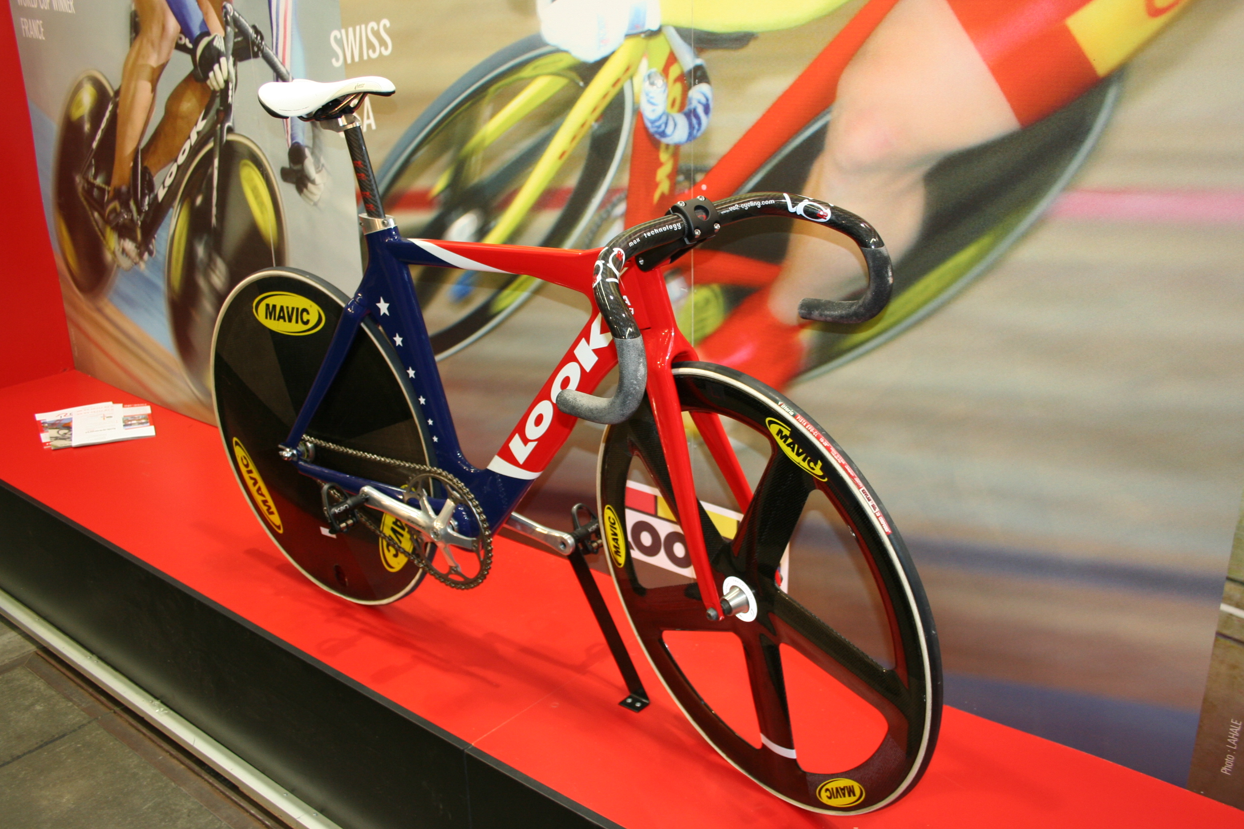 Een Look Pistefiets